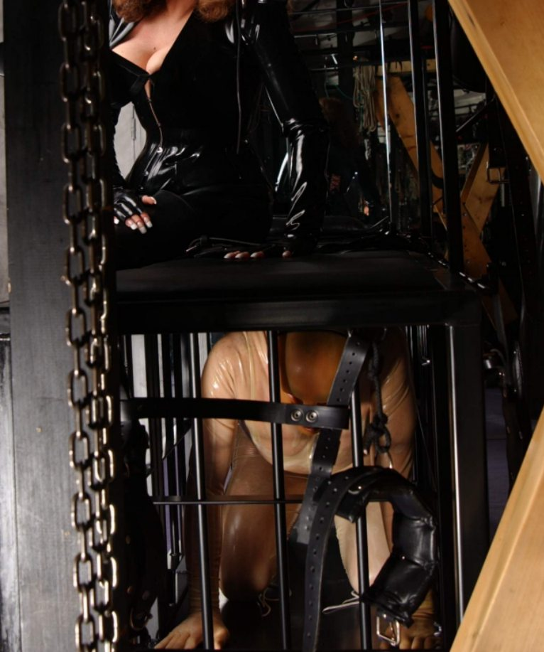 Prisonnier pour le plaisir